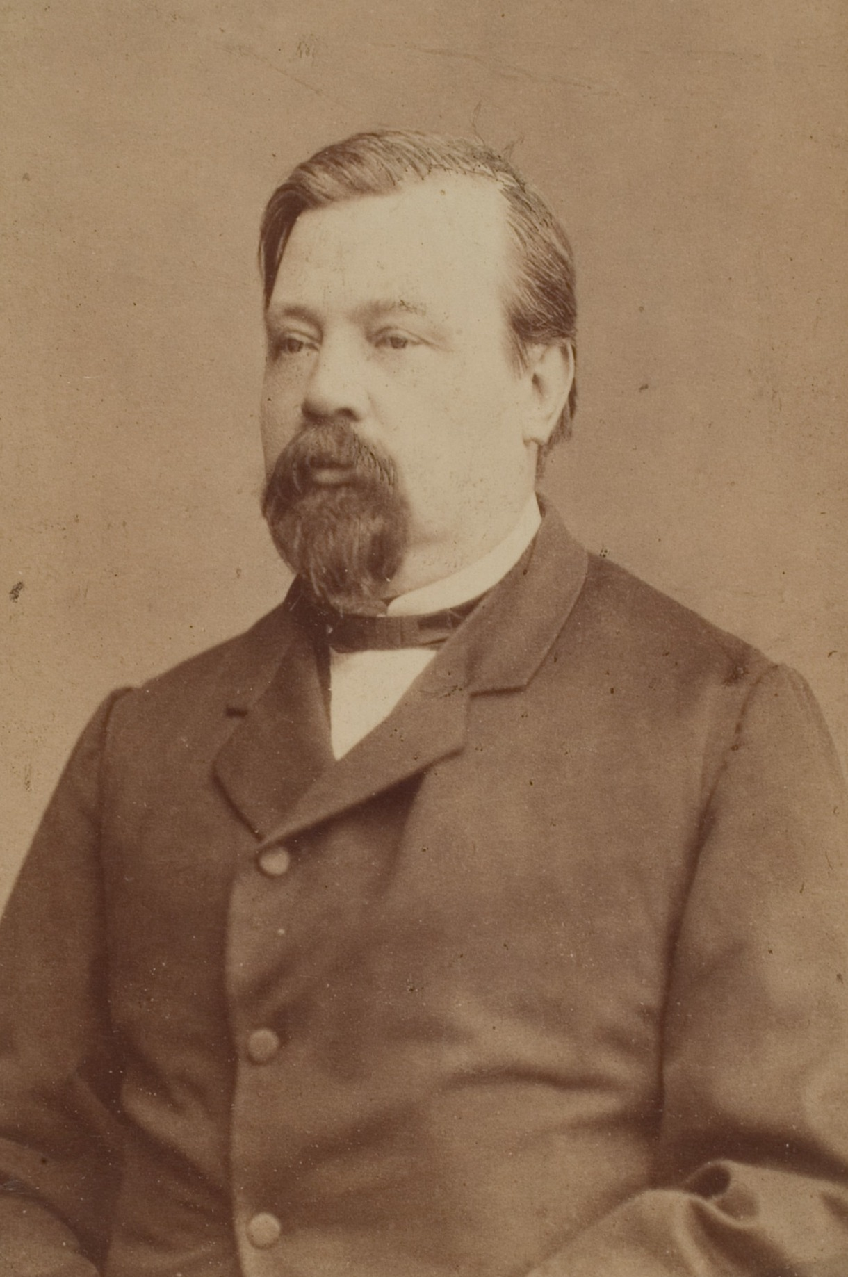 Carl Gegenbaur, Anatom und Zoologe, 1873–1901 Professor in Heidelberg